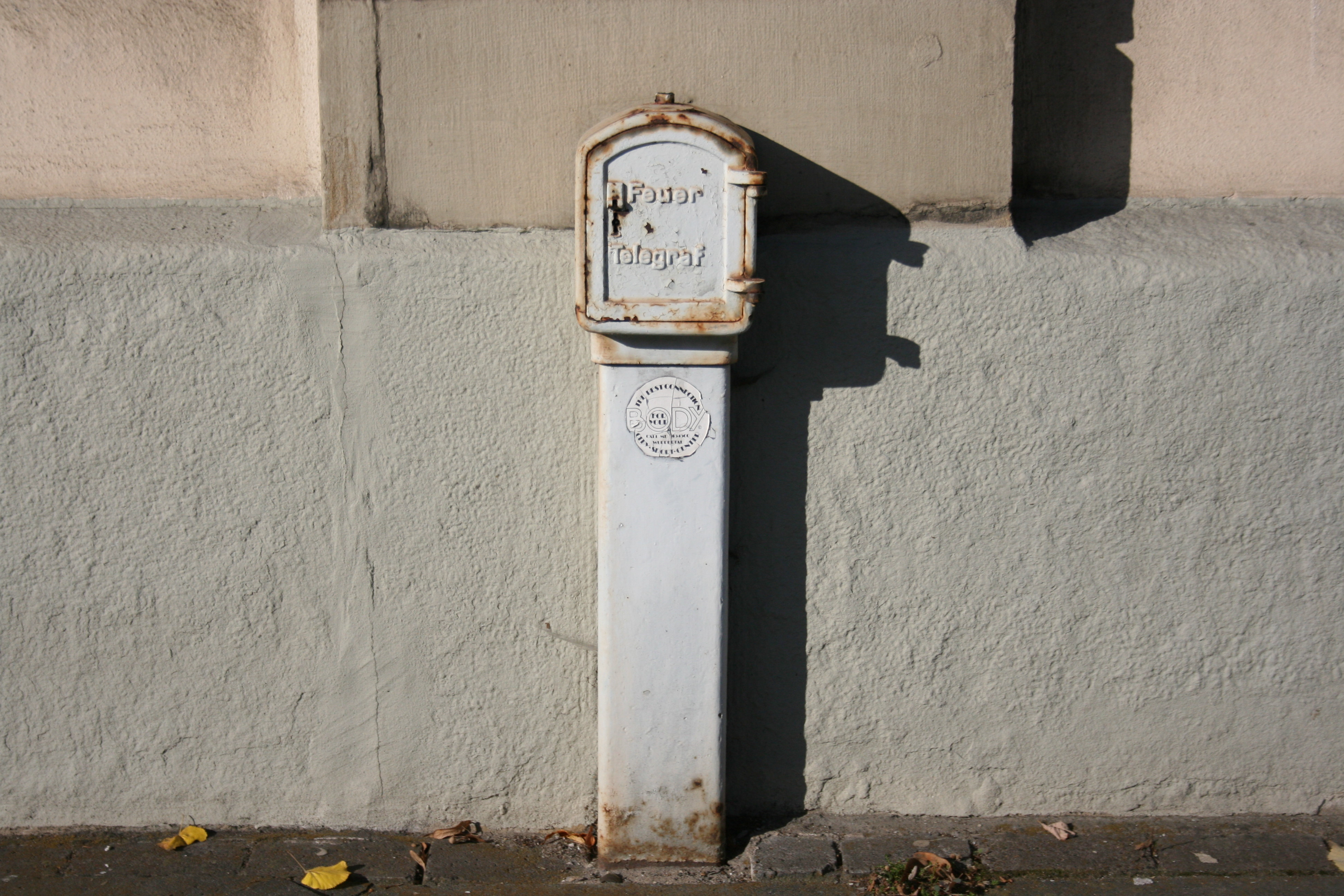 Feuertelegraf in Wuppertal